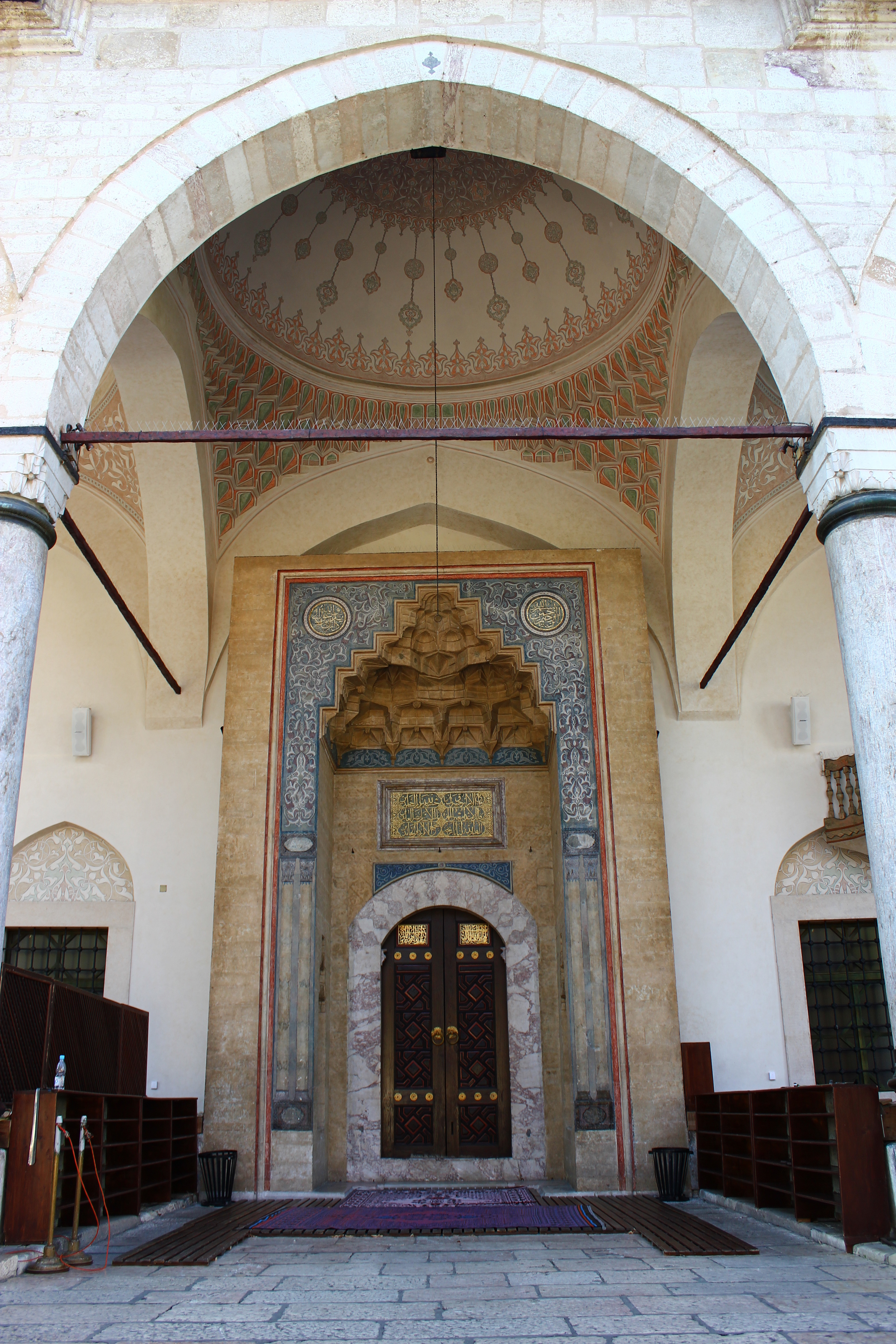 Der Eingangsbereich der Gazi-Husrev-Beg-Moschee in Sarajevo.